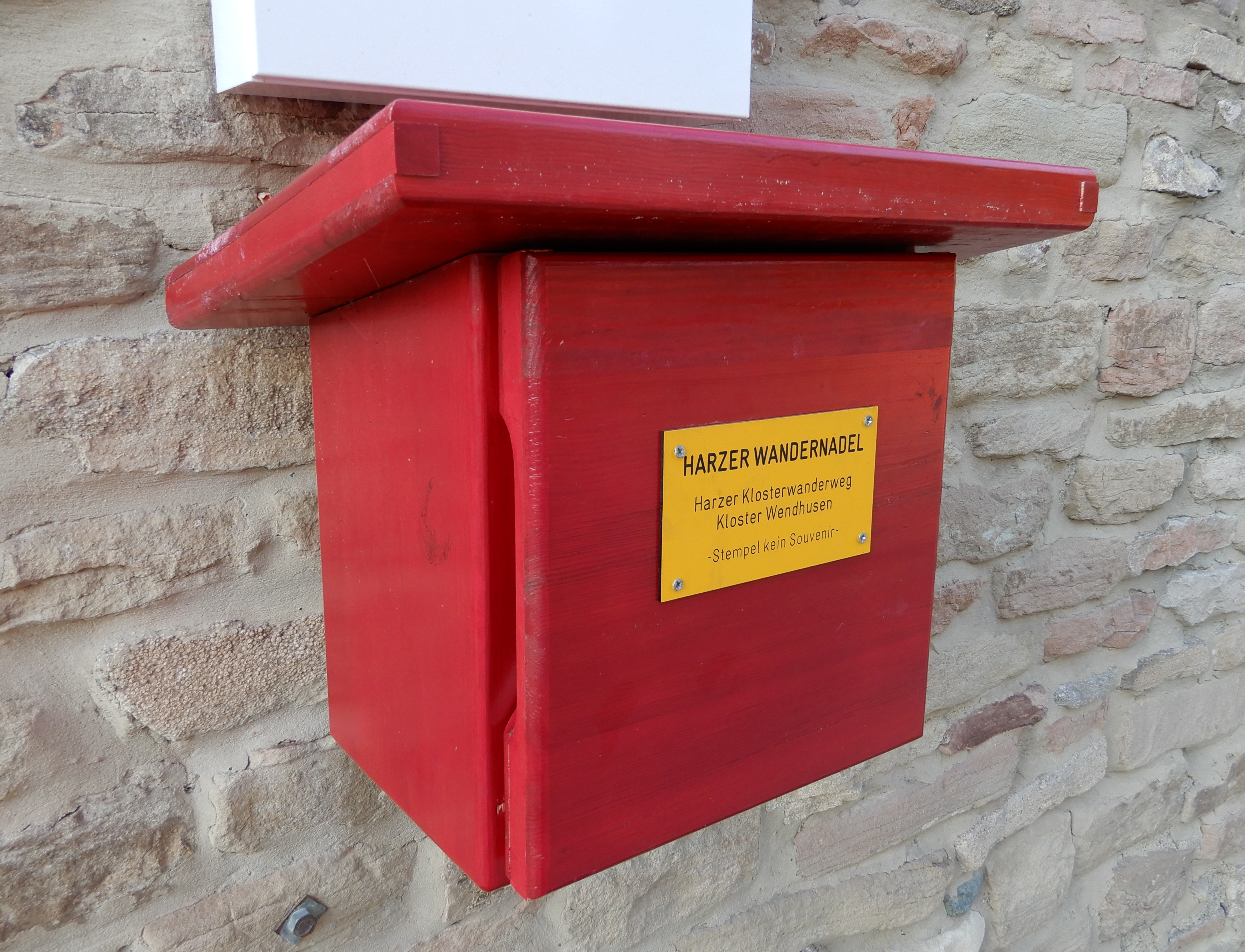 Stempelkasten der Harzer Wandernadel am Kloster Wendhusen, Thale